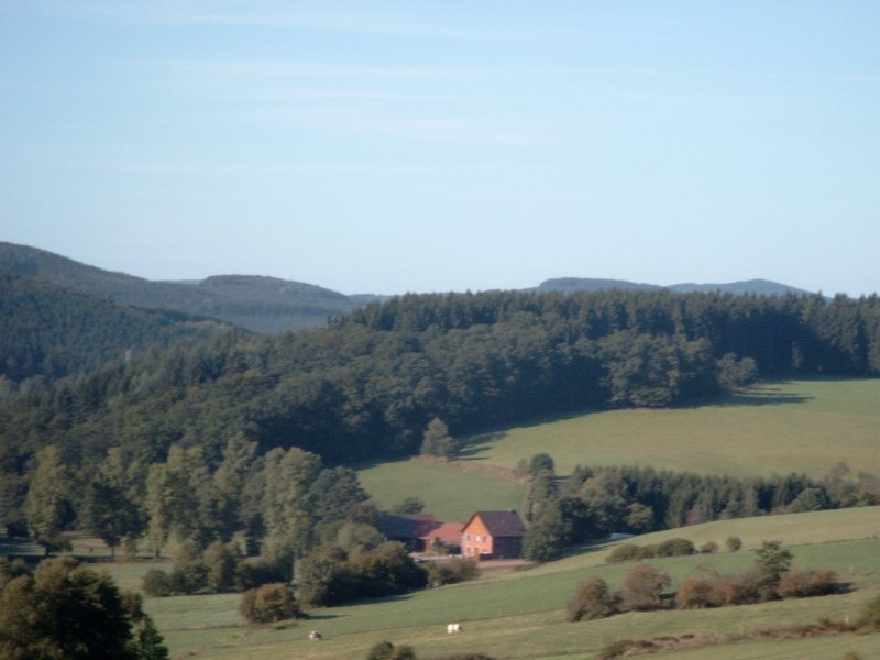 Haus Bruch in der Gemeinde Kirchhundem, NRW, Deutschland